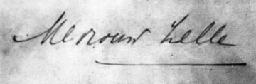 Handschrift en handtekening van Mata Hari (ps. van Margaretha Geertruida Zelle, 1876-1917) uit de periode dat ze nog Margaretha Zelle was. Zonder plaats en datum.